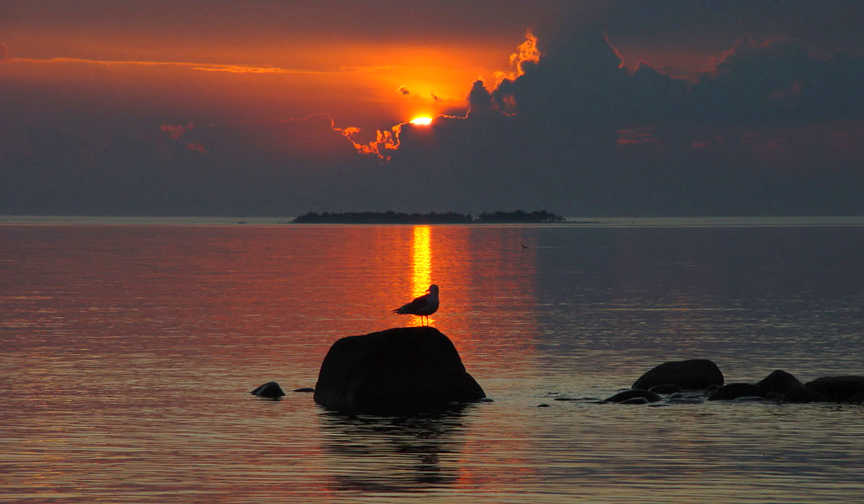 Sonnenuntergang mit Möwe am Vättern (Schweden)